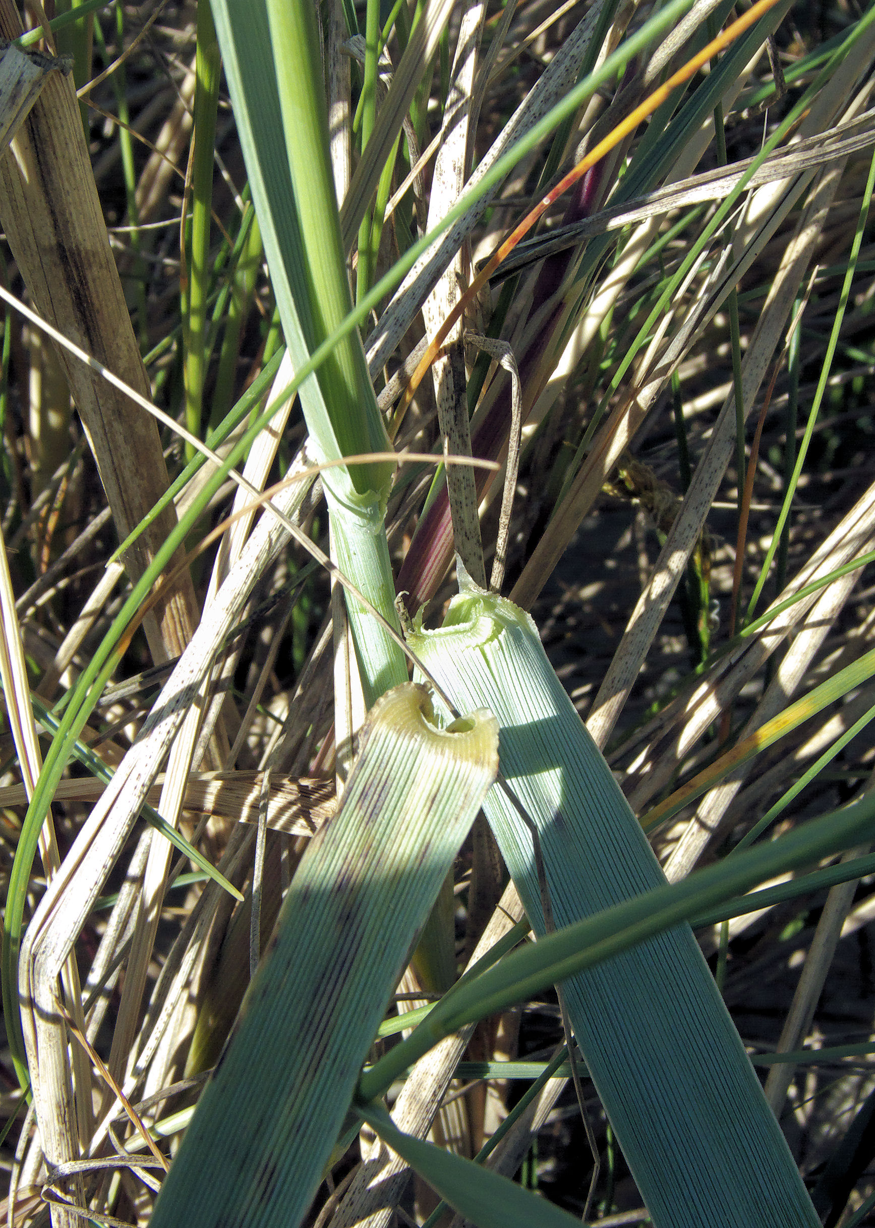 Leymus arenarius (zandhaver), tongetje en oortjes